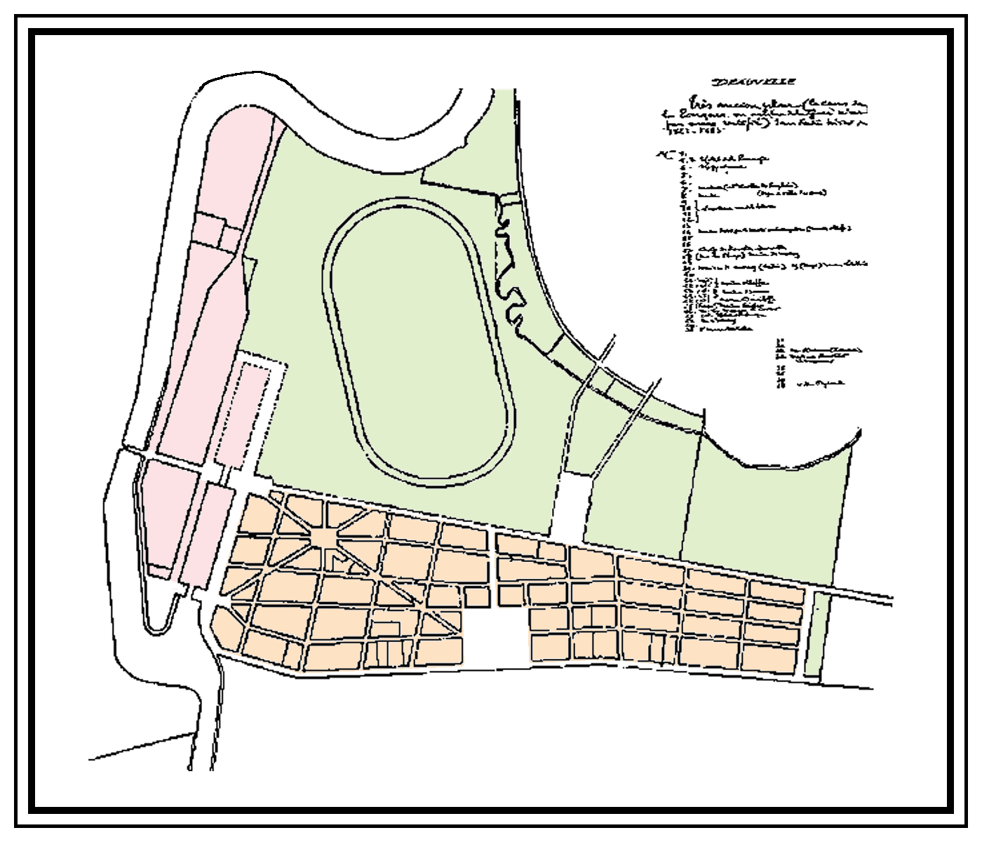 plan de Deauville entre 1860 et 1870,Dessiné par Henry Lecourt, d'après un plan dressé par le maire et architecte Breney (mis en couleur par mes soins